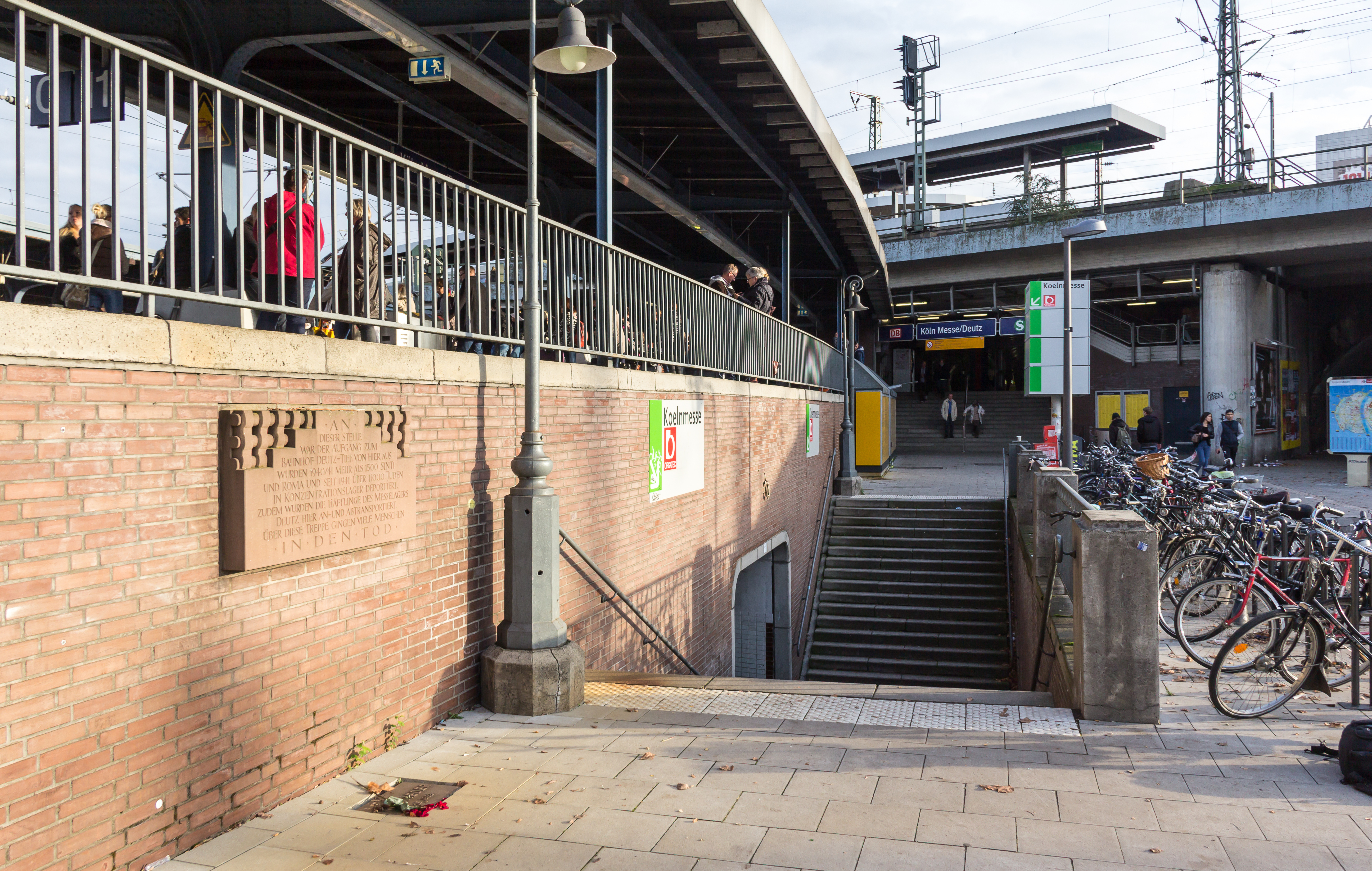 Erinnerung an die Deportationen, die vom Bahnhof Köln-Deutz ausgingenIm Fußweg eingelassen befindet sich das Mahnmal „Nie wieder“ von Helga Eitz (1993) Text: An dieser Stelle war der Aufgang zum Bahnhof Deutz-Tief. Von hier aus wurden 1940/41 mehr als 1.500 Sinti und Roma und seit 1941 über 11.000 Juden in Konzentrationslager deportiert. Zudem wurden die Häftlinge des Messelagers Deutz hier an- und abtransportiert. Über diese Treppe gingen viele Menschen in den Tod.